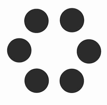 Das Logo von Revolver Publishing